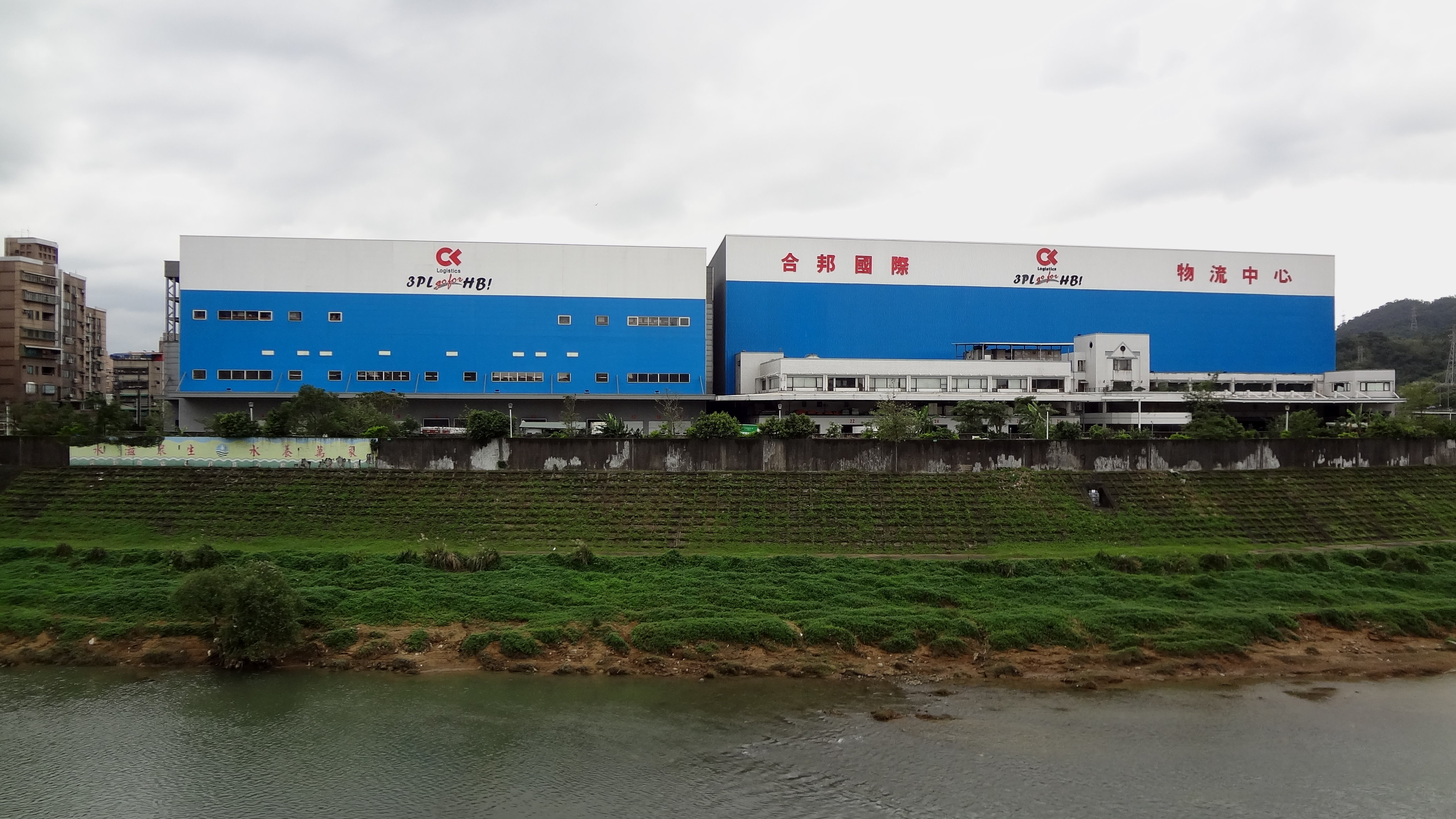 合邦國際儲運總部，位於基隆市七堵區大德路131號，原德記洋行總部。下方是基隆河。